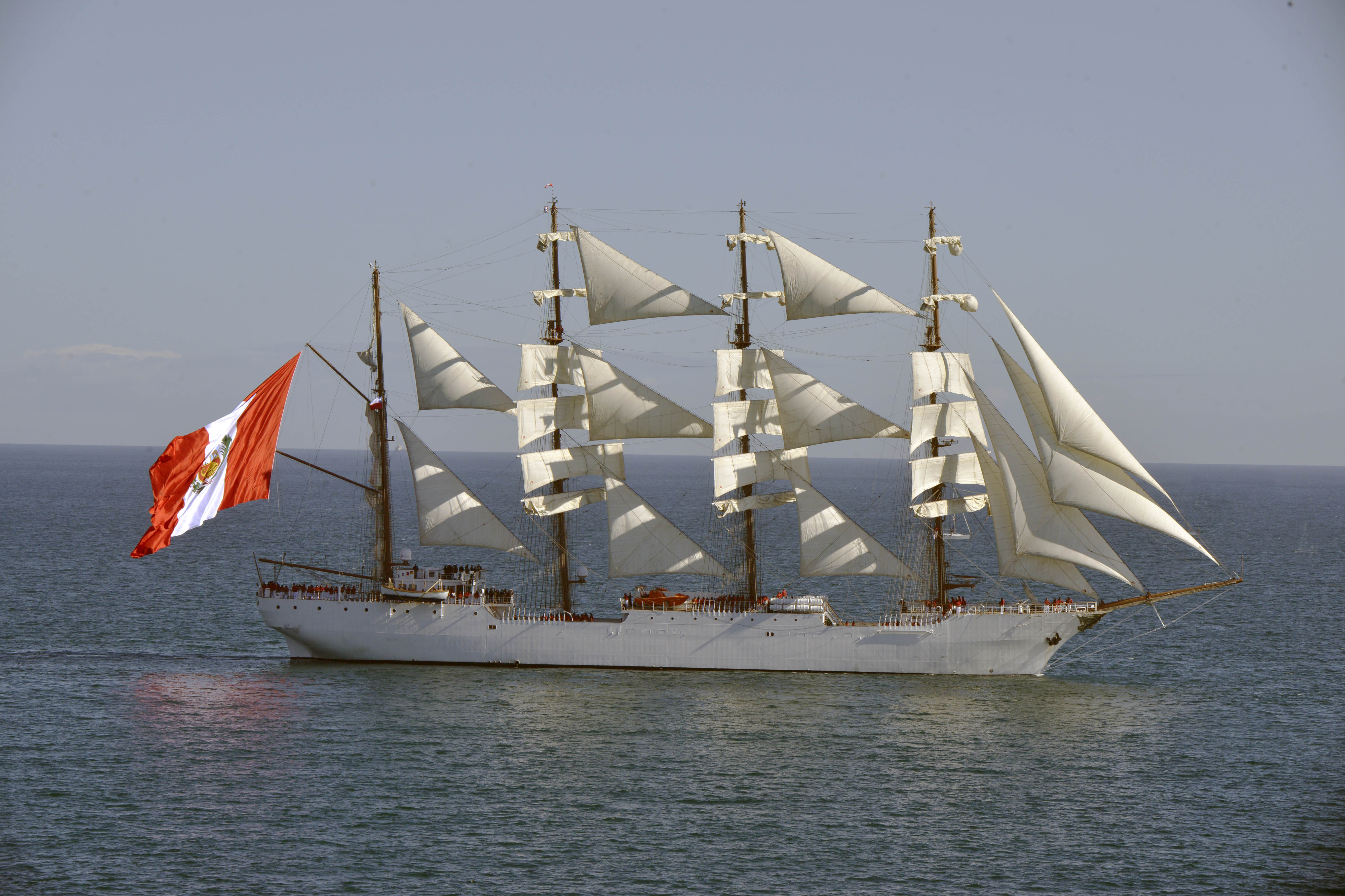 Buque Escuela Unión, de la Armada del Perú en su primera visita al puerto de Valparaiso ,3 Junio de 2018 Operacion Velas LatinoAmerica